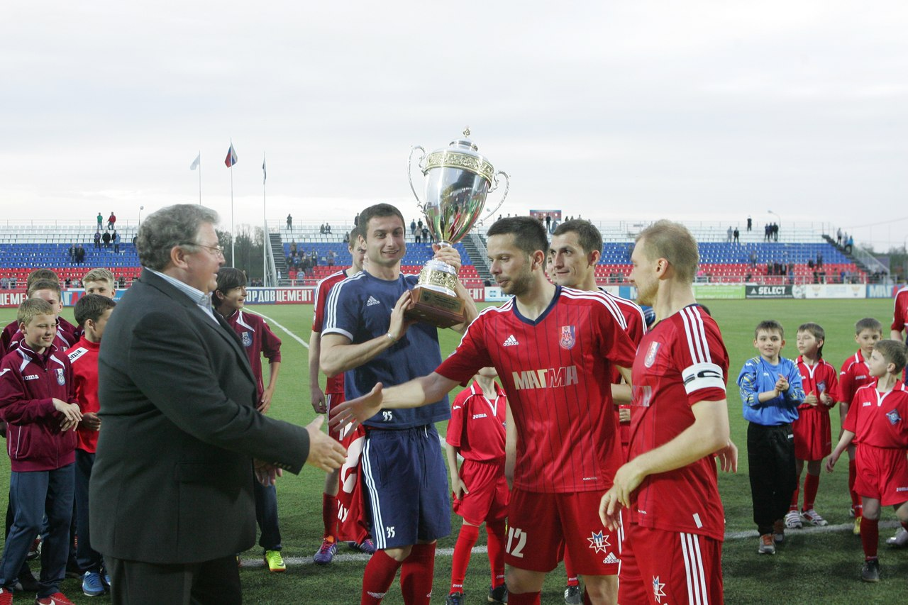 Чемпион ФНЛ